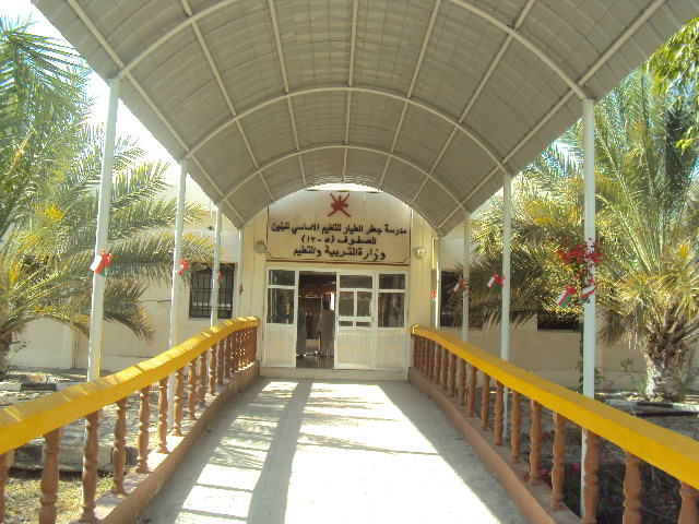 مدرسة جعفر الطيار بلدة الوقبة بشمال ولاية ينقل سلطنة عمان